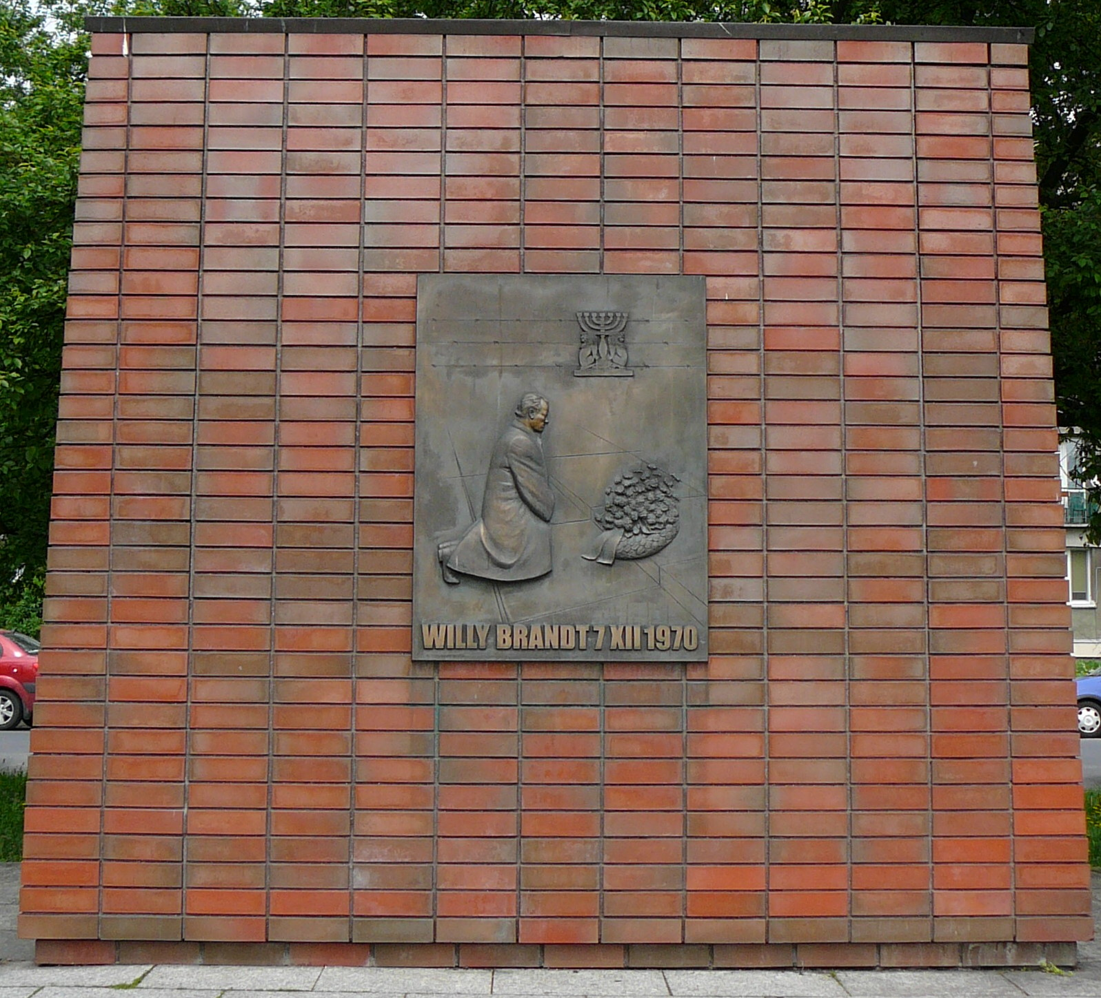 Monumento in onore di Willy Brandt a Varsavia nella omonima piazza poco lontano dal Monumento agli Eroi del Ghetto.